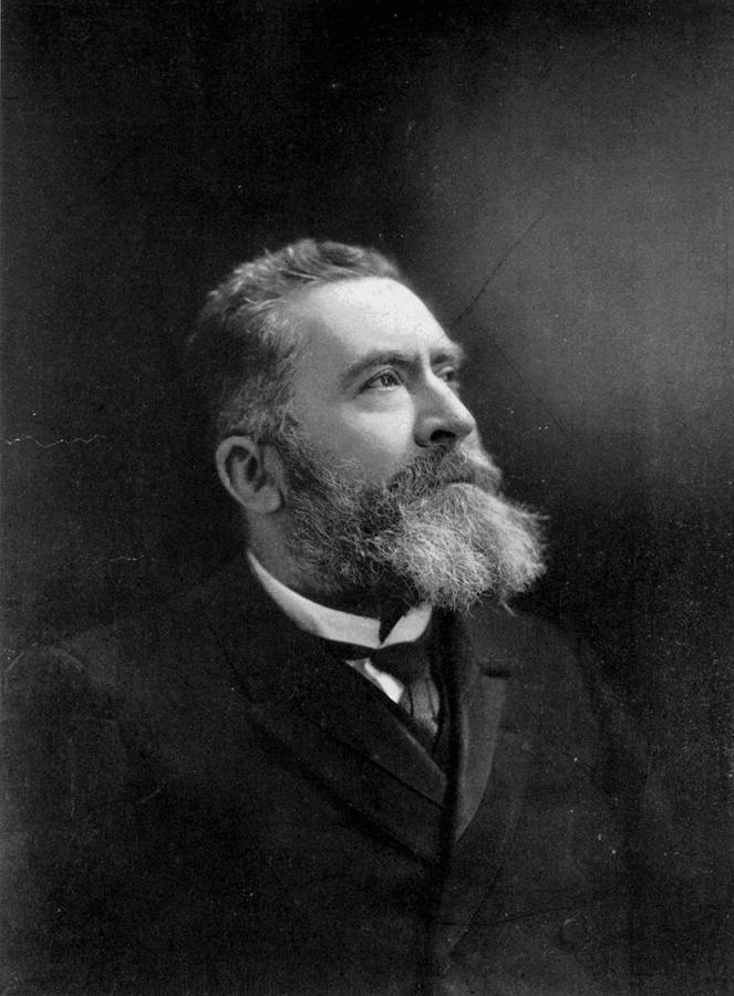 Jean Jaurès à Montevideo en Uruguay (1911).